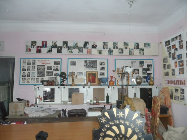 Архив